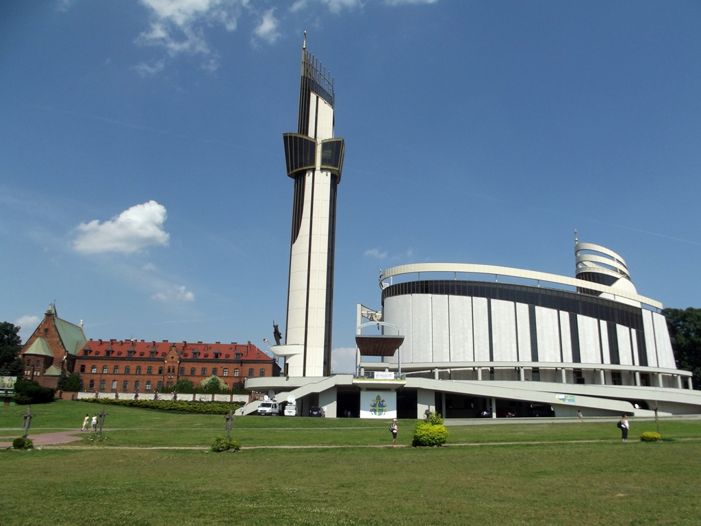 Zdjęcie zrobione podczas wydarzenia w "Rio w Krakowie", w Sanktuarium Bożego Miłosierdzia w Łagiewnikach.